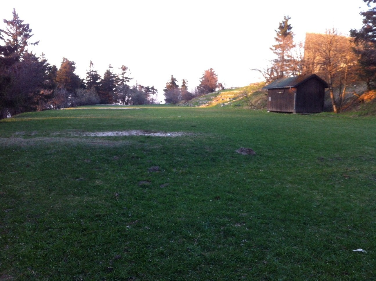 Feldbergturnfest-Platz auf dem Großer Feldberg